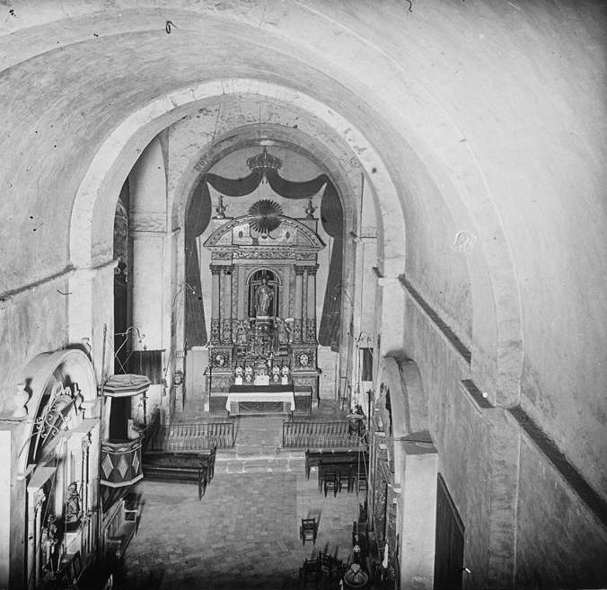 Interior de l'església de Sant Jaume de Frontanyà. Josep Salvany i Blanch (1918)